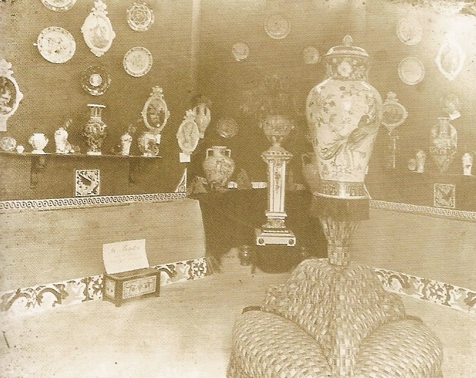 Detalle del pabellón de la familia Zuloaga en la Exposición de Minería, Artes Metalúrgicas, Cerámica, Cristalería y Aguas Minerales celebrada en el Parque del Retiro de Madrid en 1883.